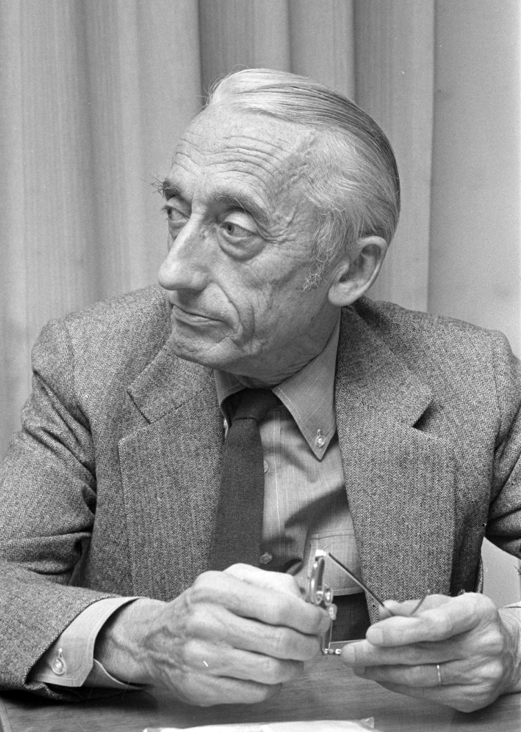 Le commandant Cousteau en 1972 à La Haye pour une conférence. Photo libre de droits. Archives des Pays-Bas. Anefo